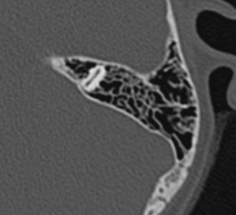 CT einer komplett pneumatisierten Felsenbein-Pyramidenspitze (mit oberem Bogengang) - axial (Blick von oben)